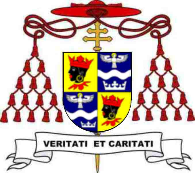 Joseph Wendel, 1901-1960, Erzbischof von München und Freising (1952-1960)